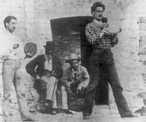 I campioni di ruzzola Carlo Fontana e Enrico Mascagni, in una foto della fine del XIX secolo.